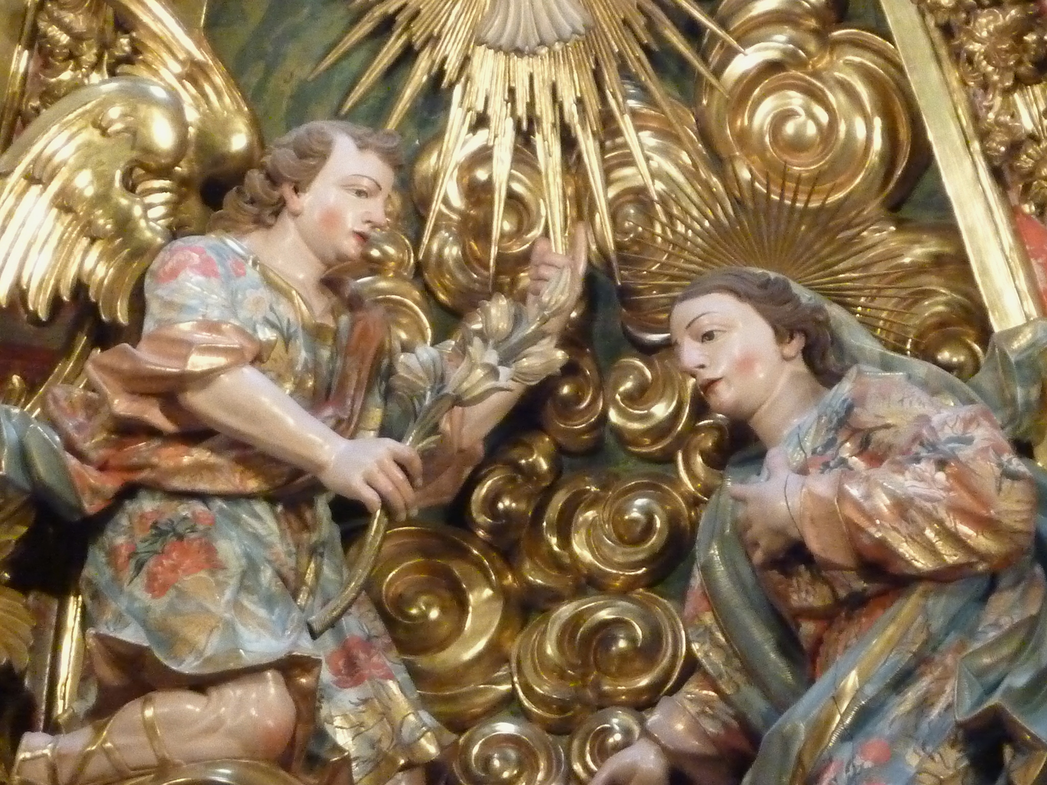 Església de Sant Llorenç de Morunys: l'Anunciació al retaule de la Mare de Déu dels Colls